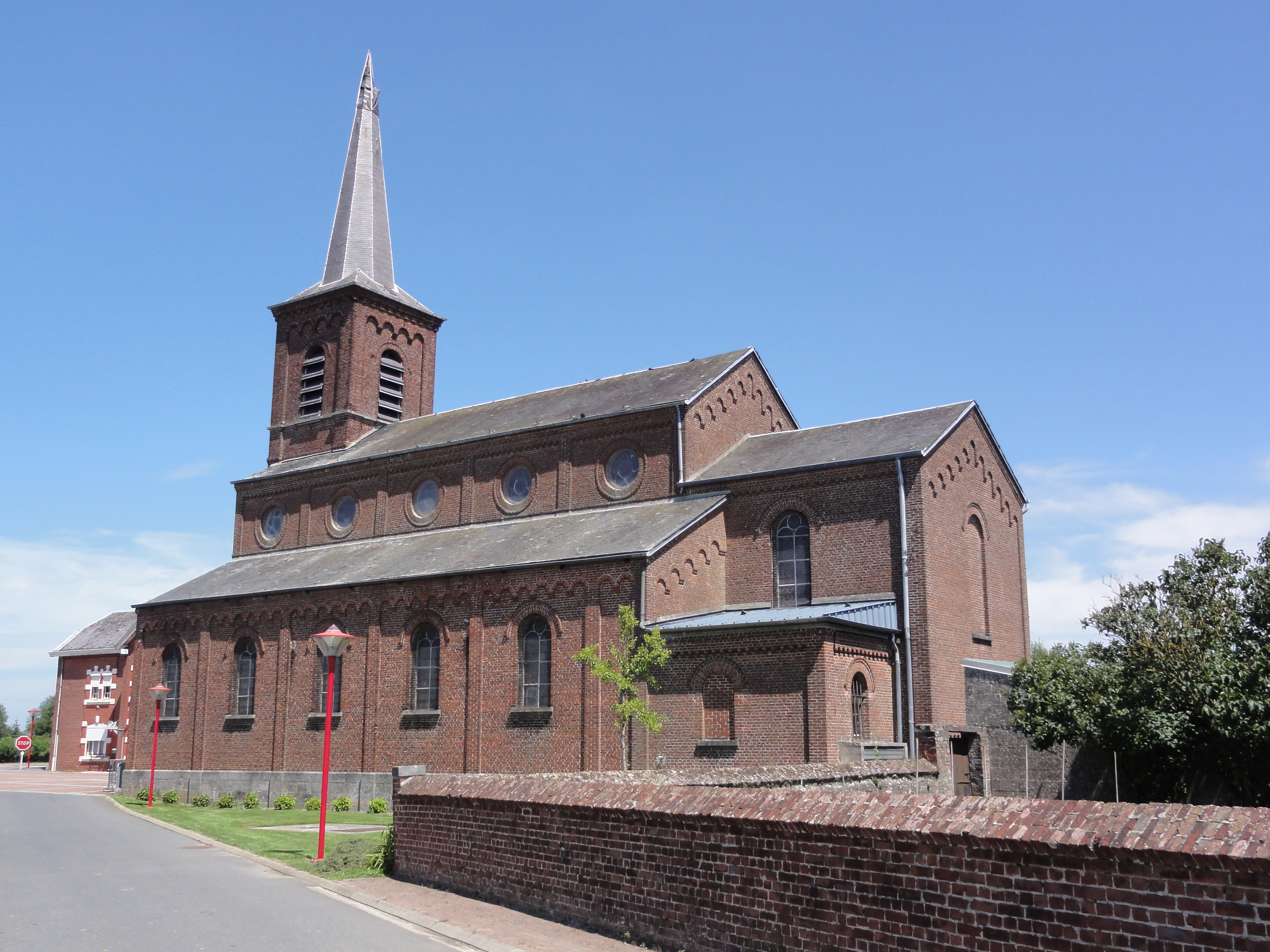 Beugnies (Nord, Fr) église, latéral, arrière